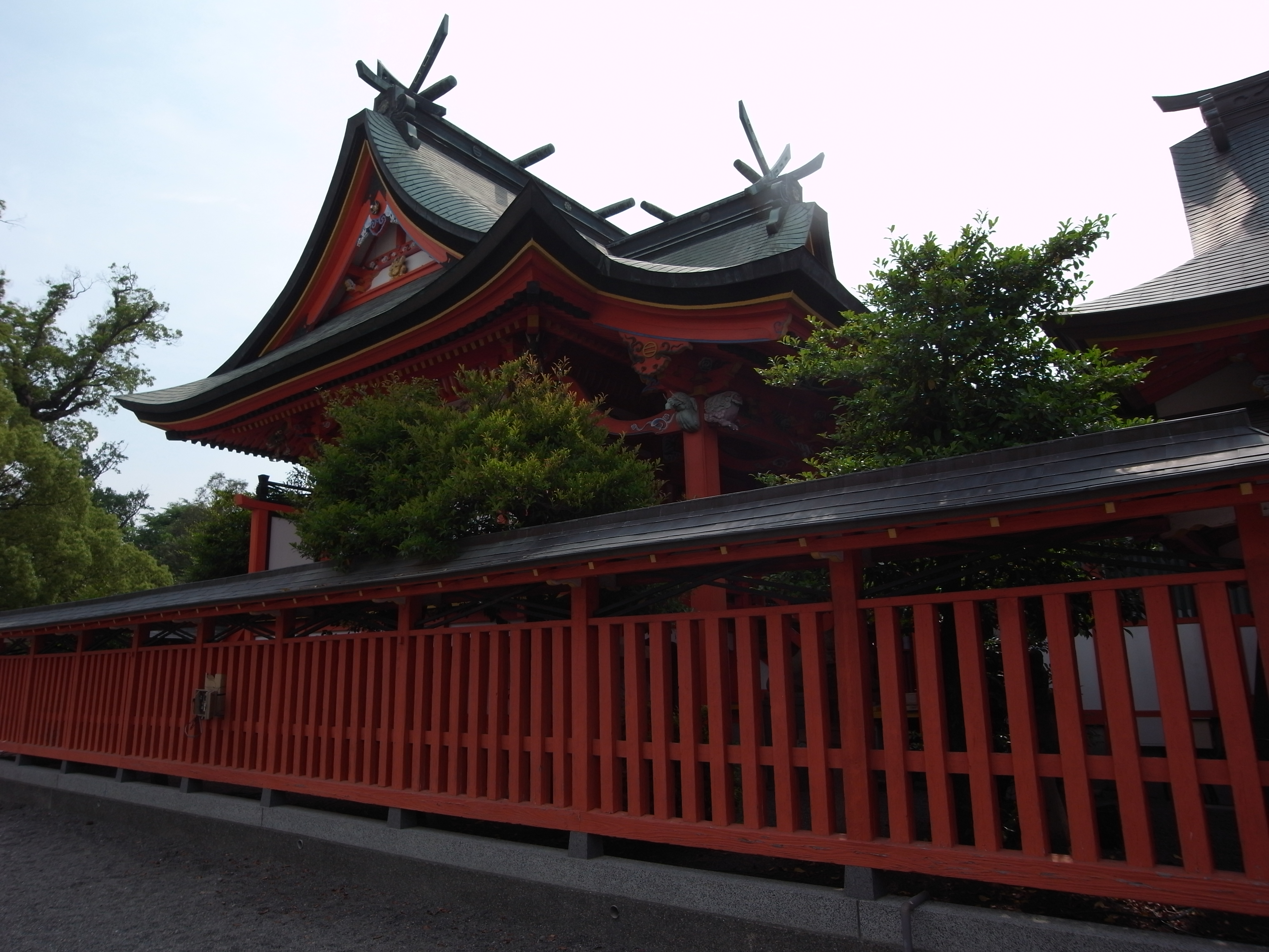 八代神社 本殿